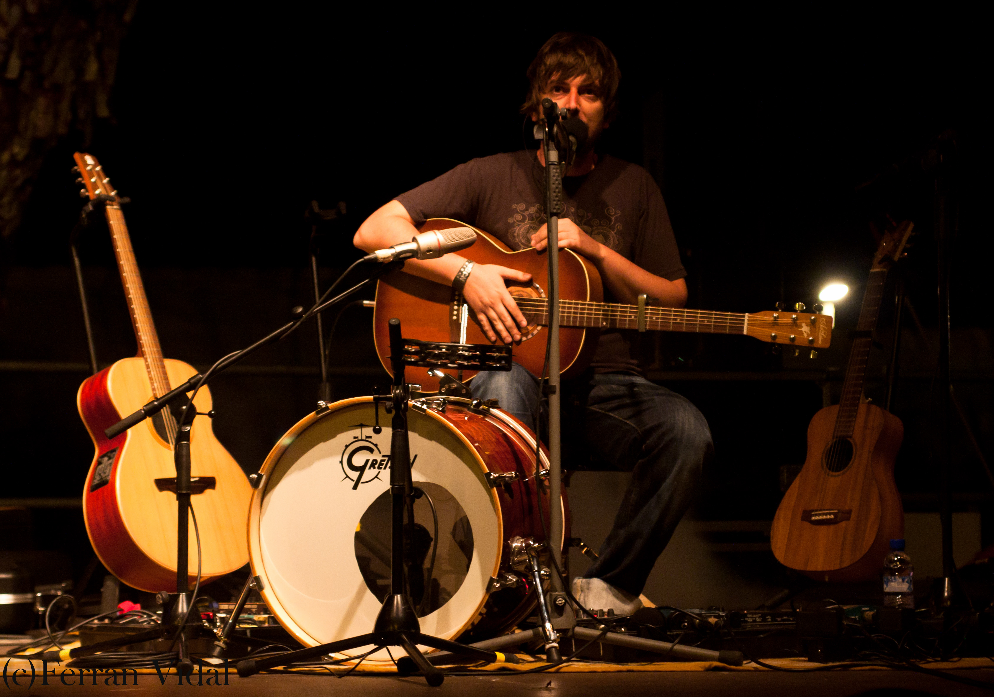 Concert Pau Vallvé, 8 de juliol de 2011, Festival Cruïlla Barcelona, Parc del Fòrum. Pau Vallvé.